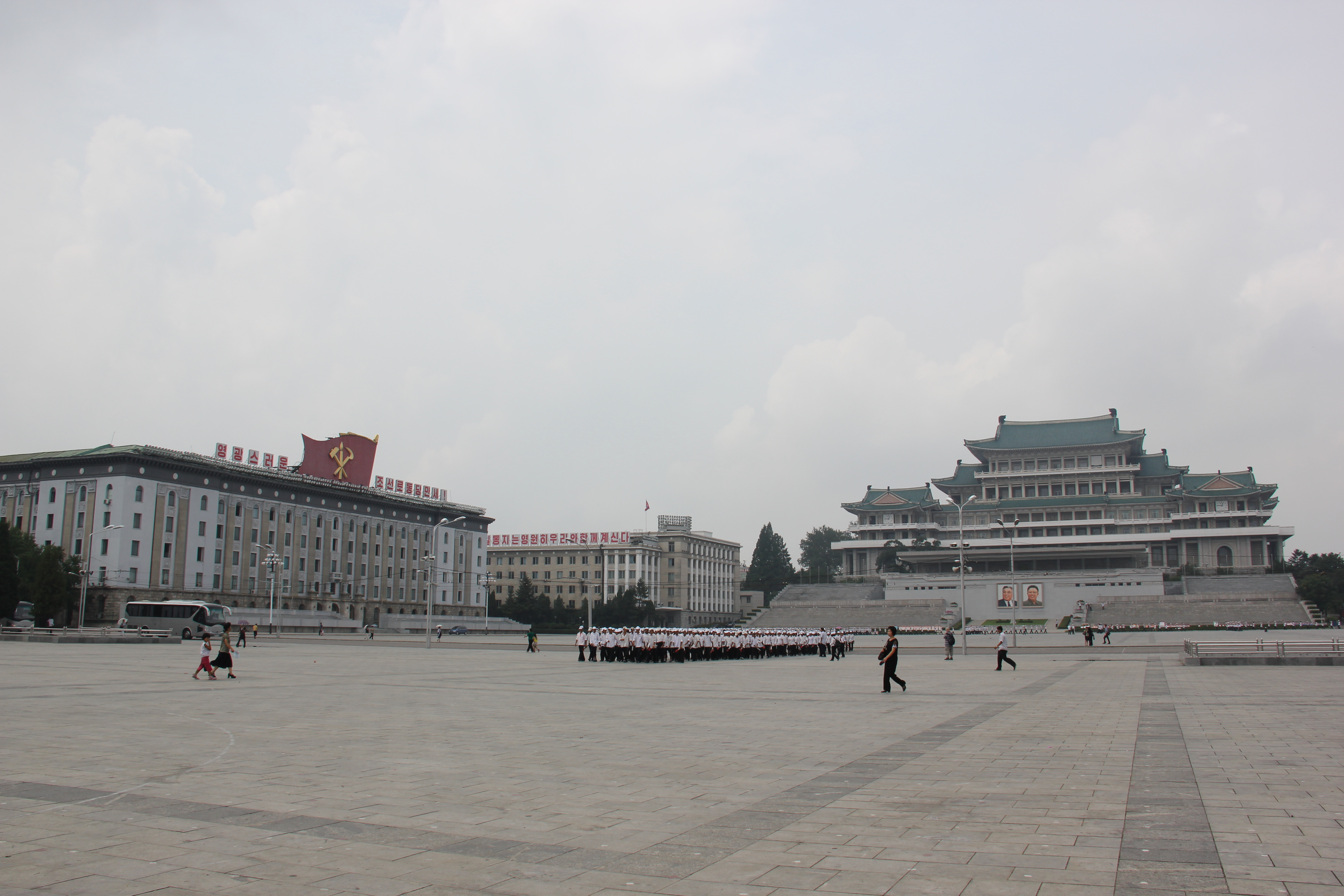 Kim Il Sung Square